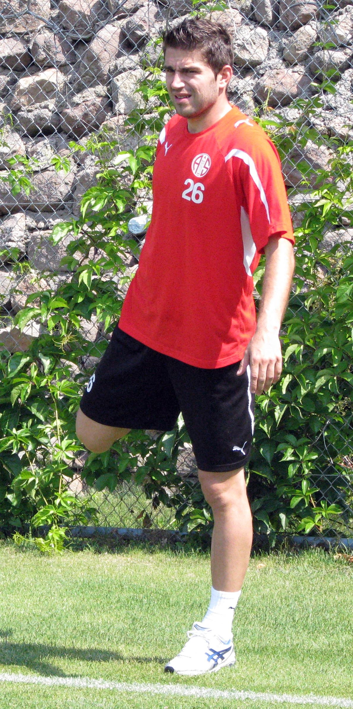 İvan Antalyaspor forması giyerken. Photo : Murat Özgen